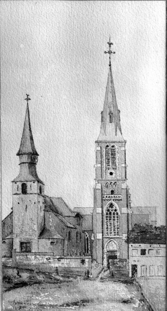 Ancienne (1778) et nouvelle (1885) église de St.Gertrude à Etterbeek, Place Van Meyel